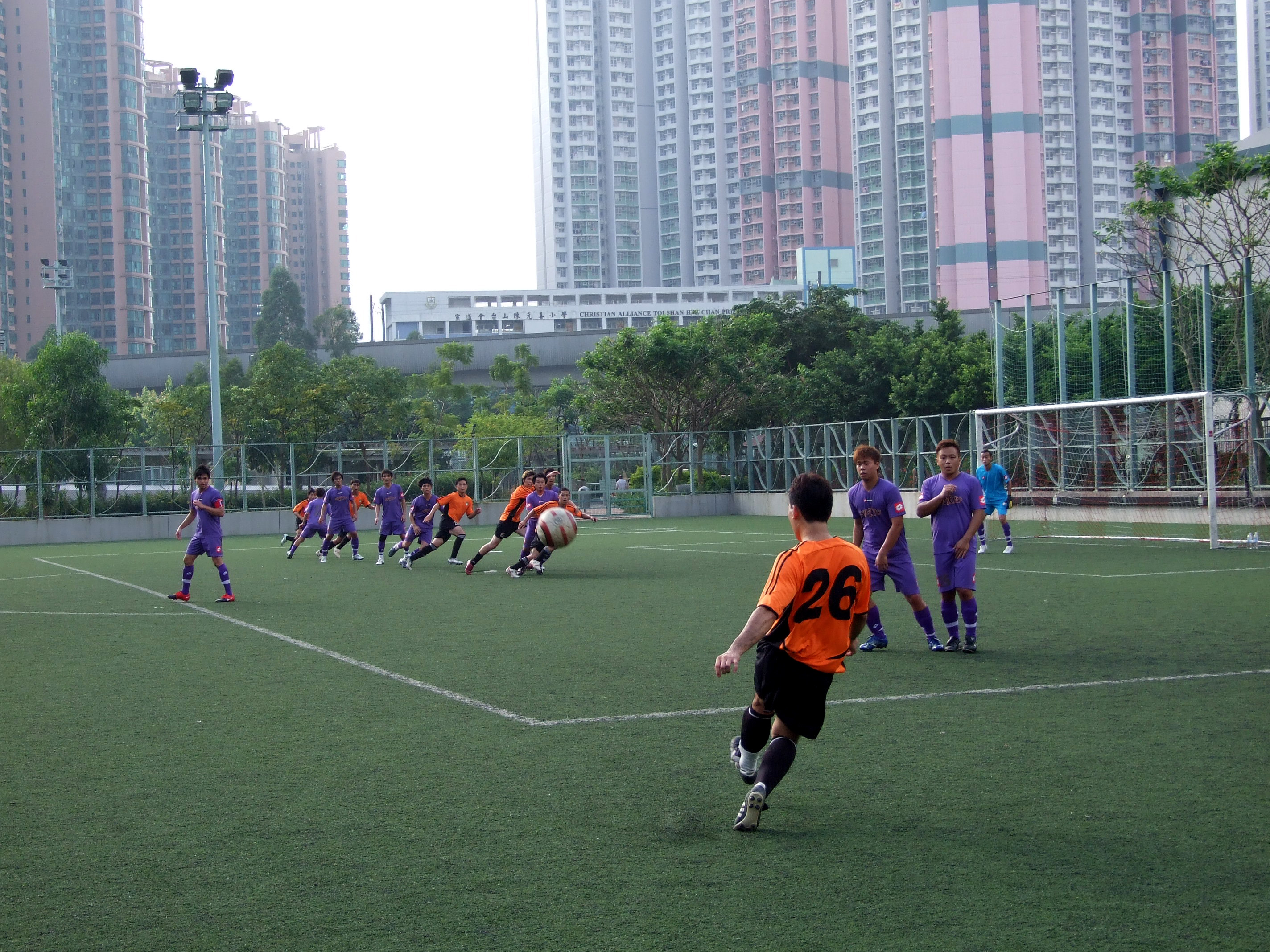 中文（香港）: 香港丙組(甲)聯賽東昇對五一七